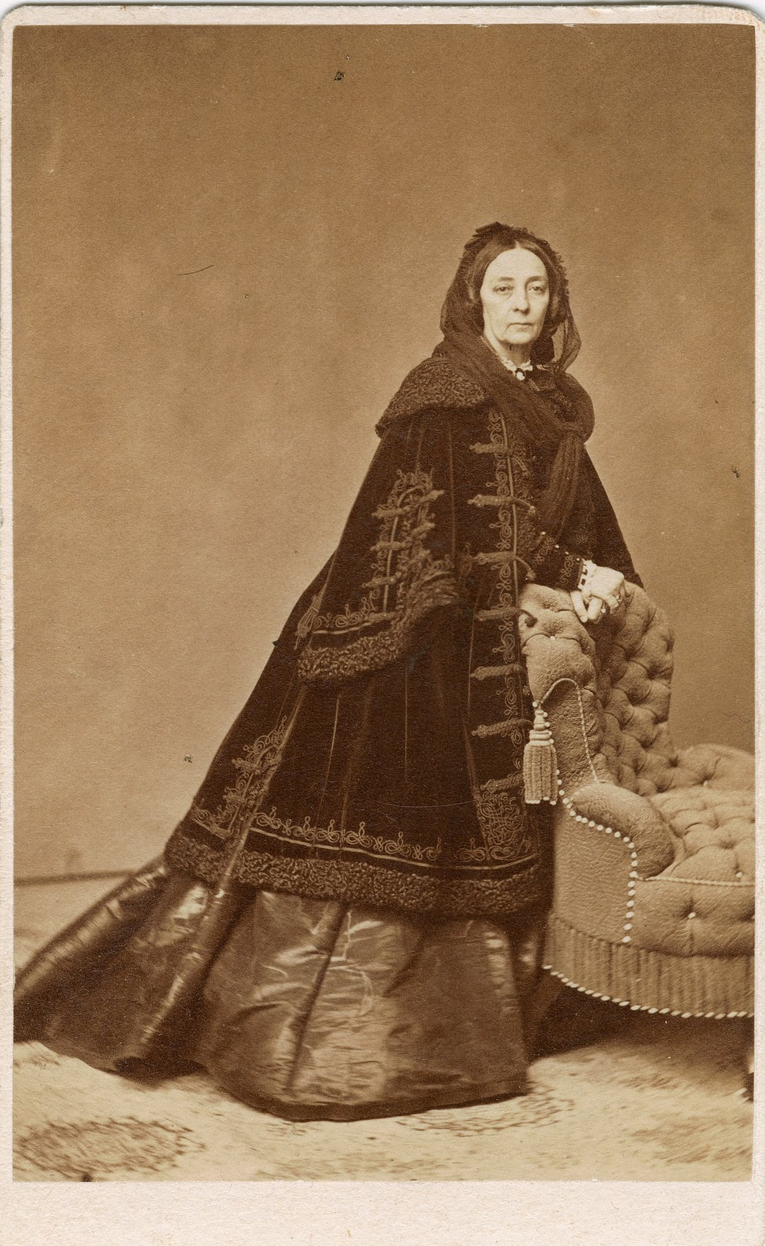 Batthyány Lajosné Zichy Antónia (1816–1888) portréja. Az 1870-es években készült fénykép